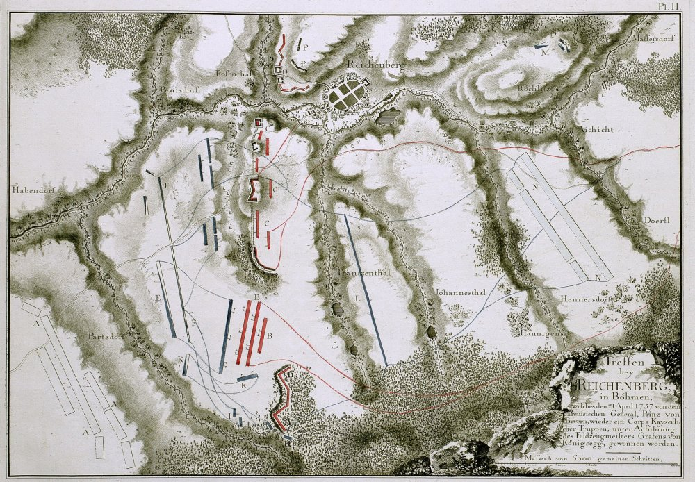 Plan des Gefechts bei Reichenberg zwischen den Preußen unter Prinz von Bevern und den Kaiserlichen unter Graf Königsegg, 21. April 1757,Kupferstich, koloriert